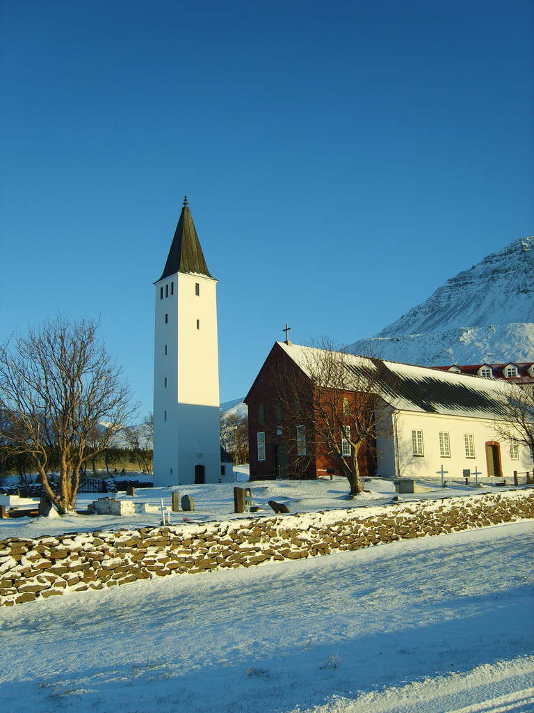 Hóladómkirkja, Hjaltadal, Iceland